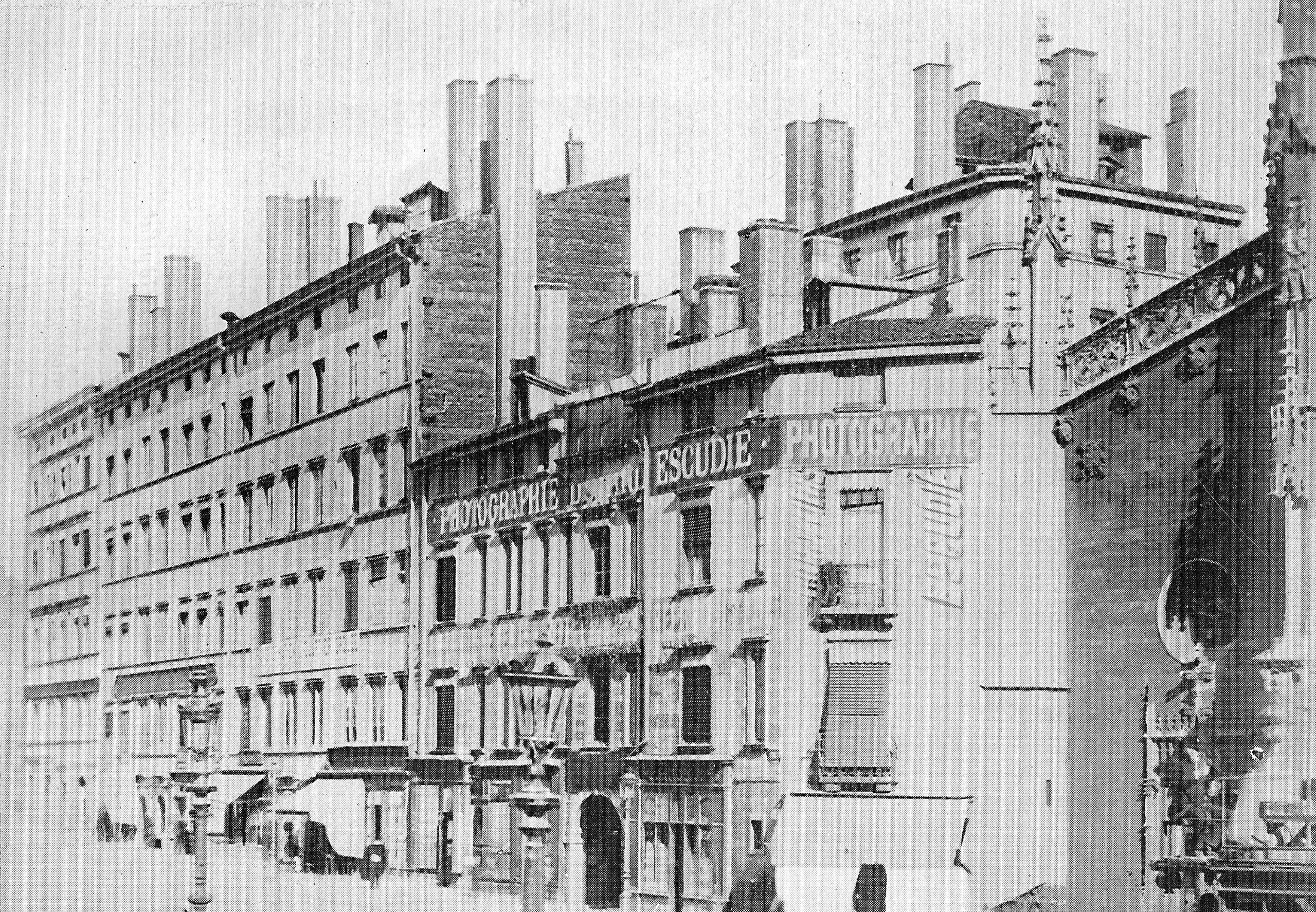 Immeubles attenant à l'église des Cordeliers avant leur destruction vers 1890 à Lyon